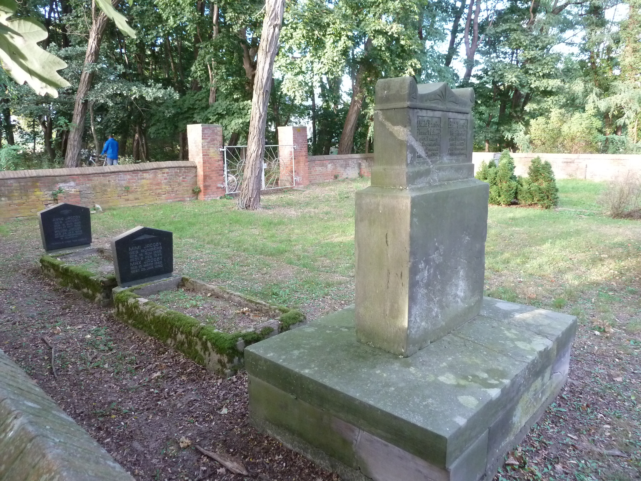 Jüdischer Friedhof, Grabmal der Familie Jacoby